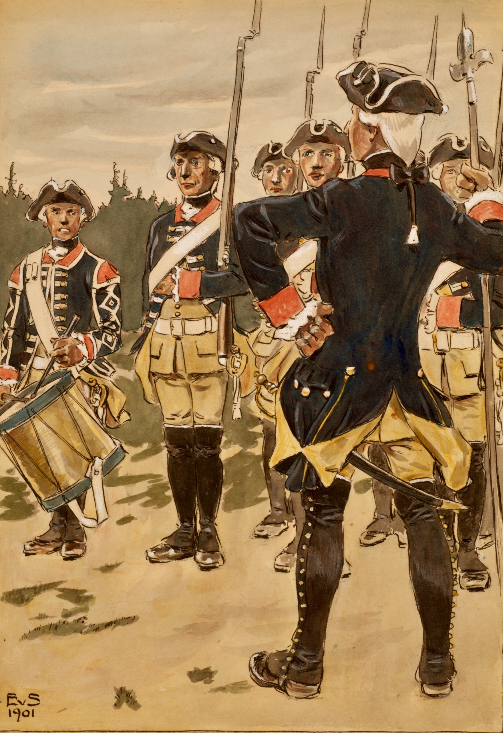 Uniform m/1765 för Upplands regemente, teckning av Einar von Strokirch.